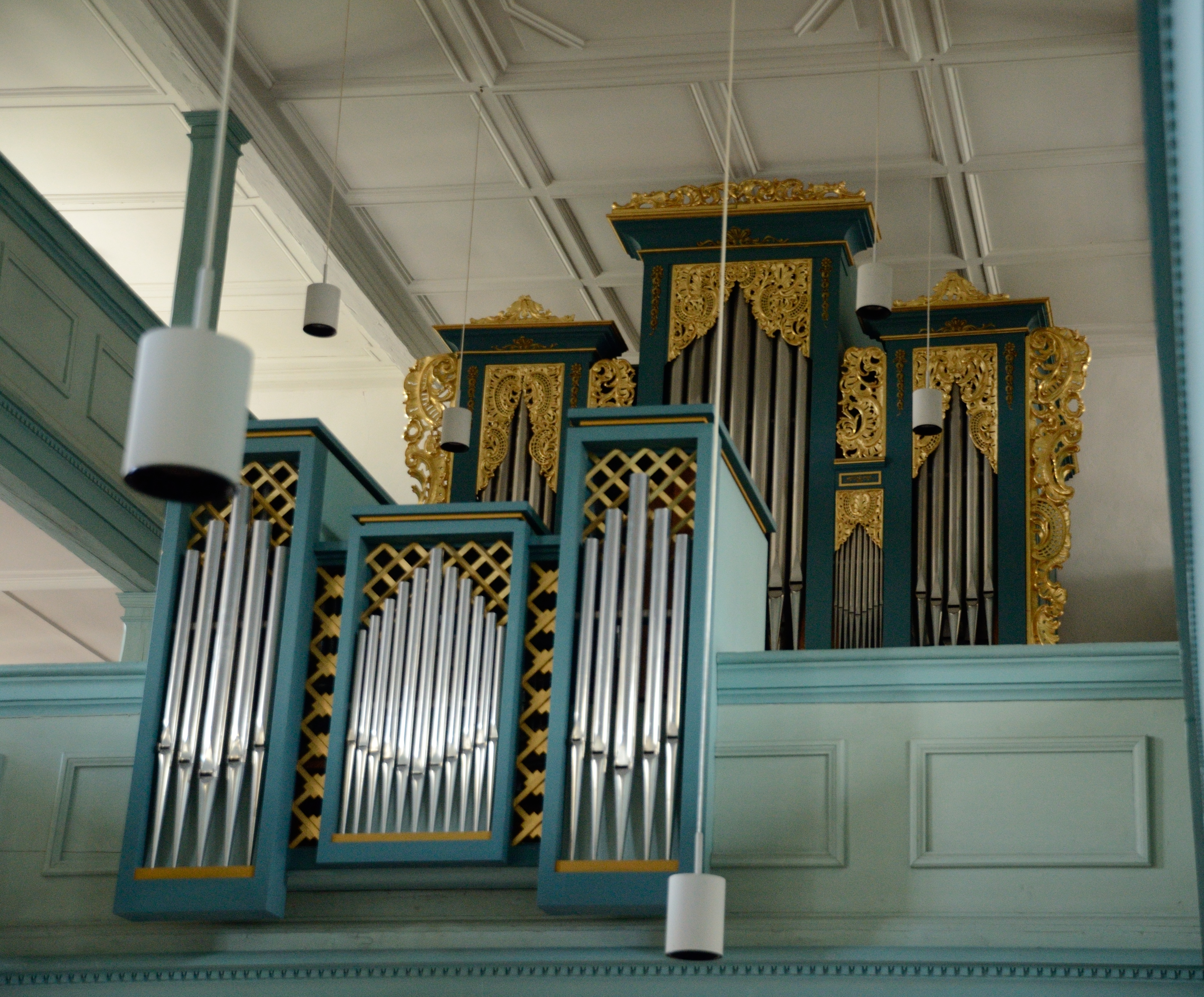 St. Alban, Sachsen bei Ansbach, Kirchenorgel